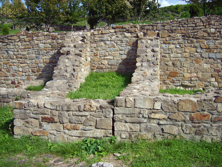 Основи на надземни жилища, Царевец